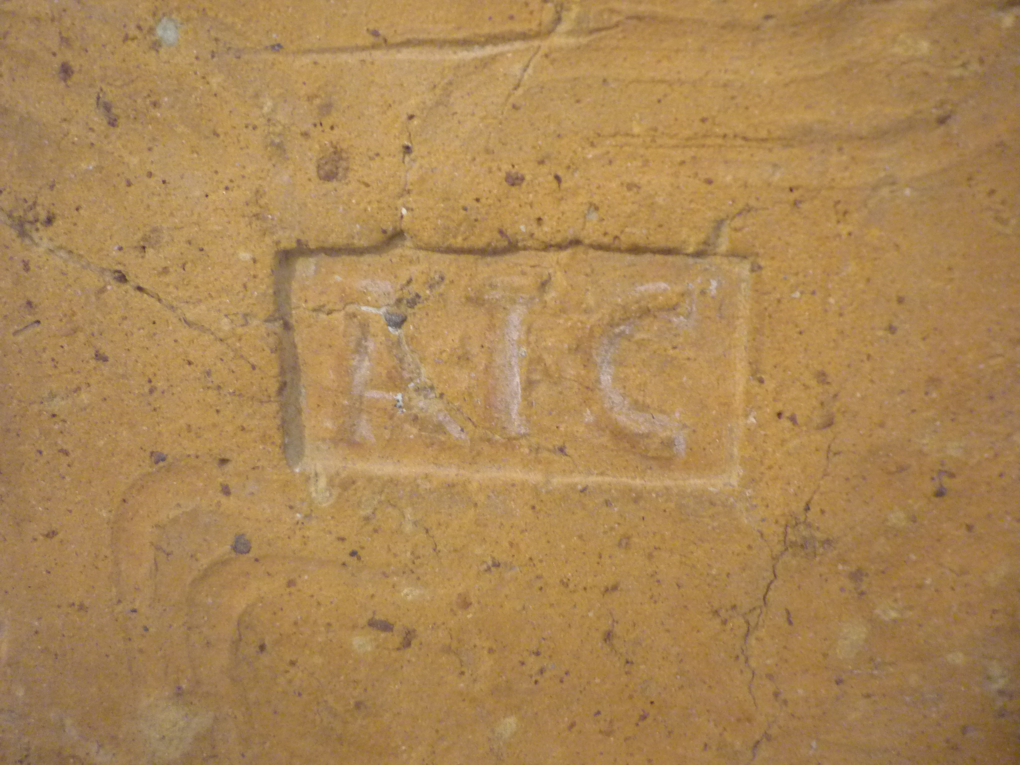 Stempelabdruck AIC [= A(la) I C(ommagenorum)] auf Plattenziegel (later) 2 Jhdt n.Chr., Tulln, NÖ - römisches Museum Tulln